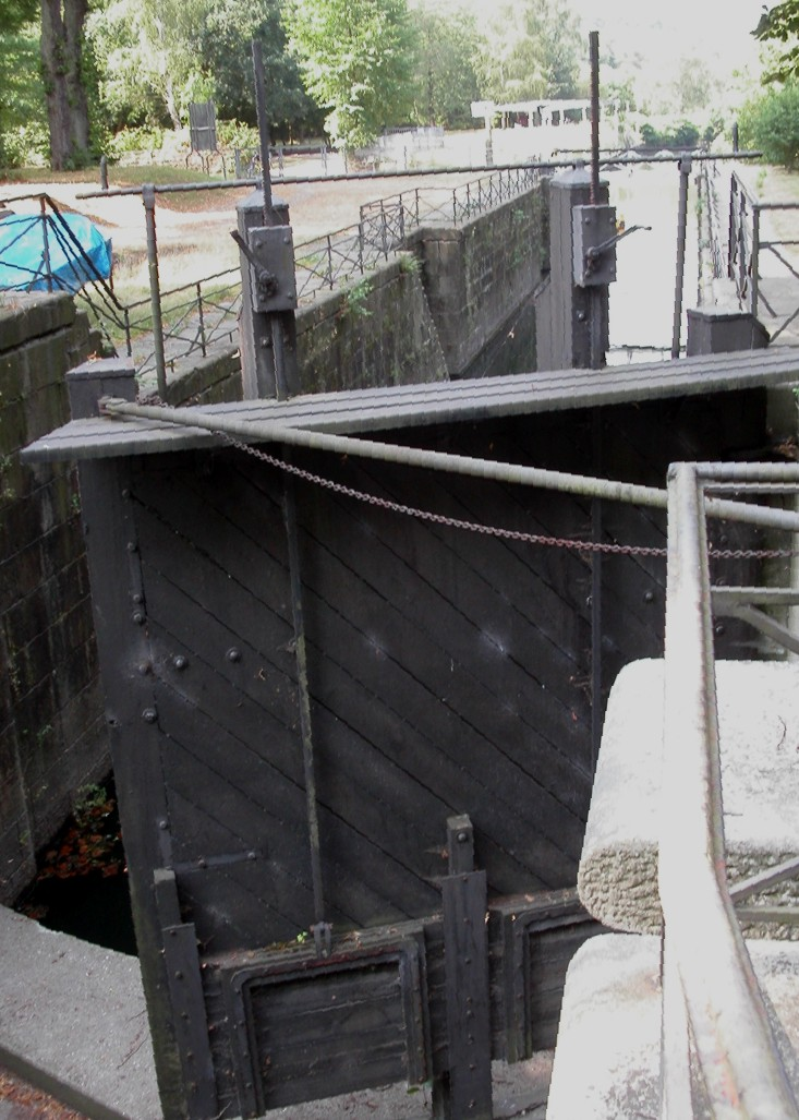 Tor der Papiermühlenschleuse in Werden